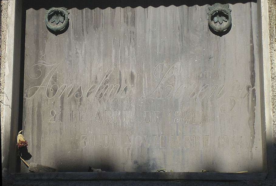 Anselmo Lorenzo (lápida) al cementiri Montjuic